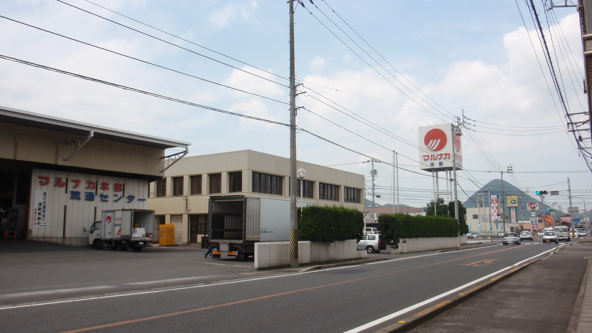 香川県高松市にあるマルナカ本社及び物流センター。